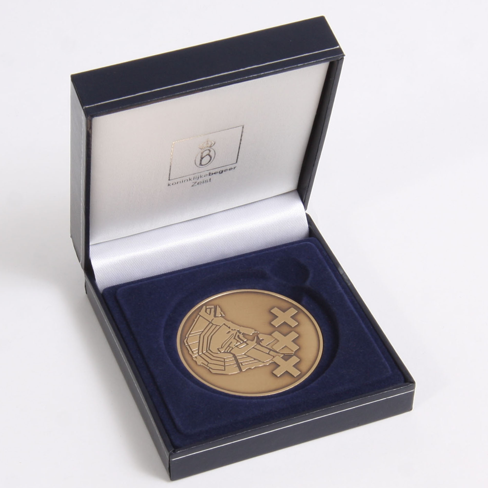 Andreaspenning, 50mm doorsnede, 3mm dikte